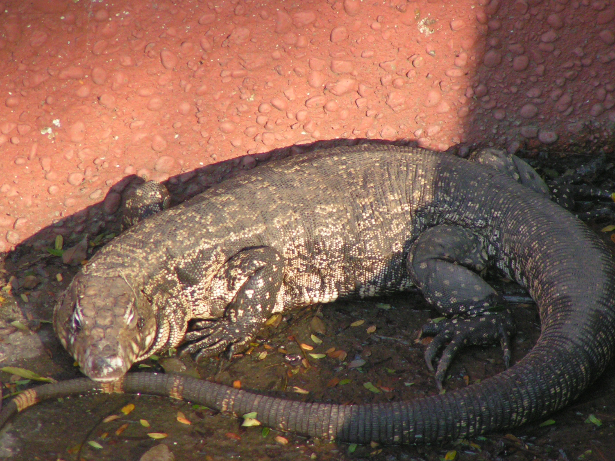 Iguana overa (Tupinambis merianae)